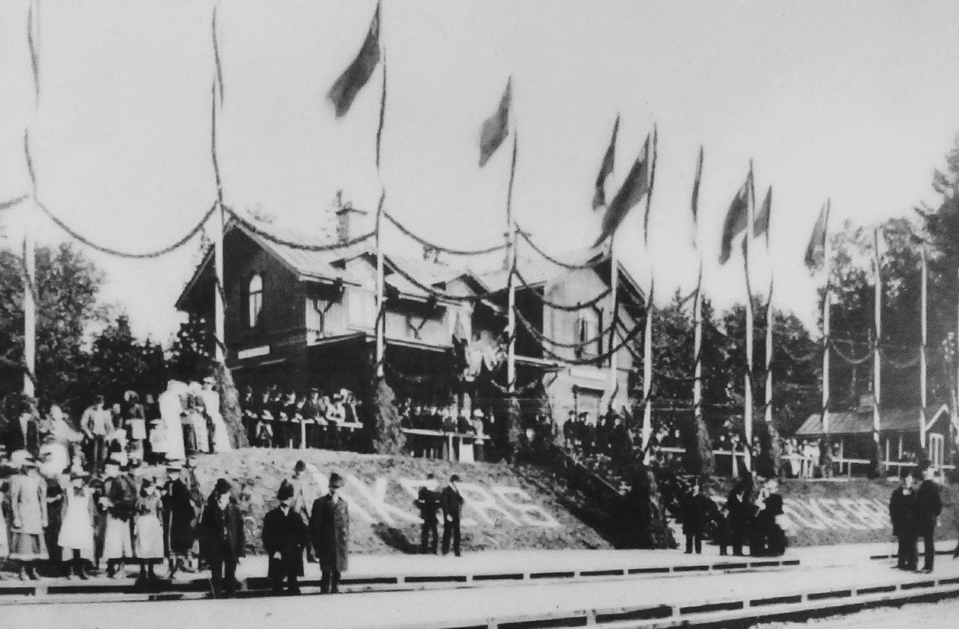 Norra Södermanlands Järnväg, invigning av station Åkers styckebruk